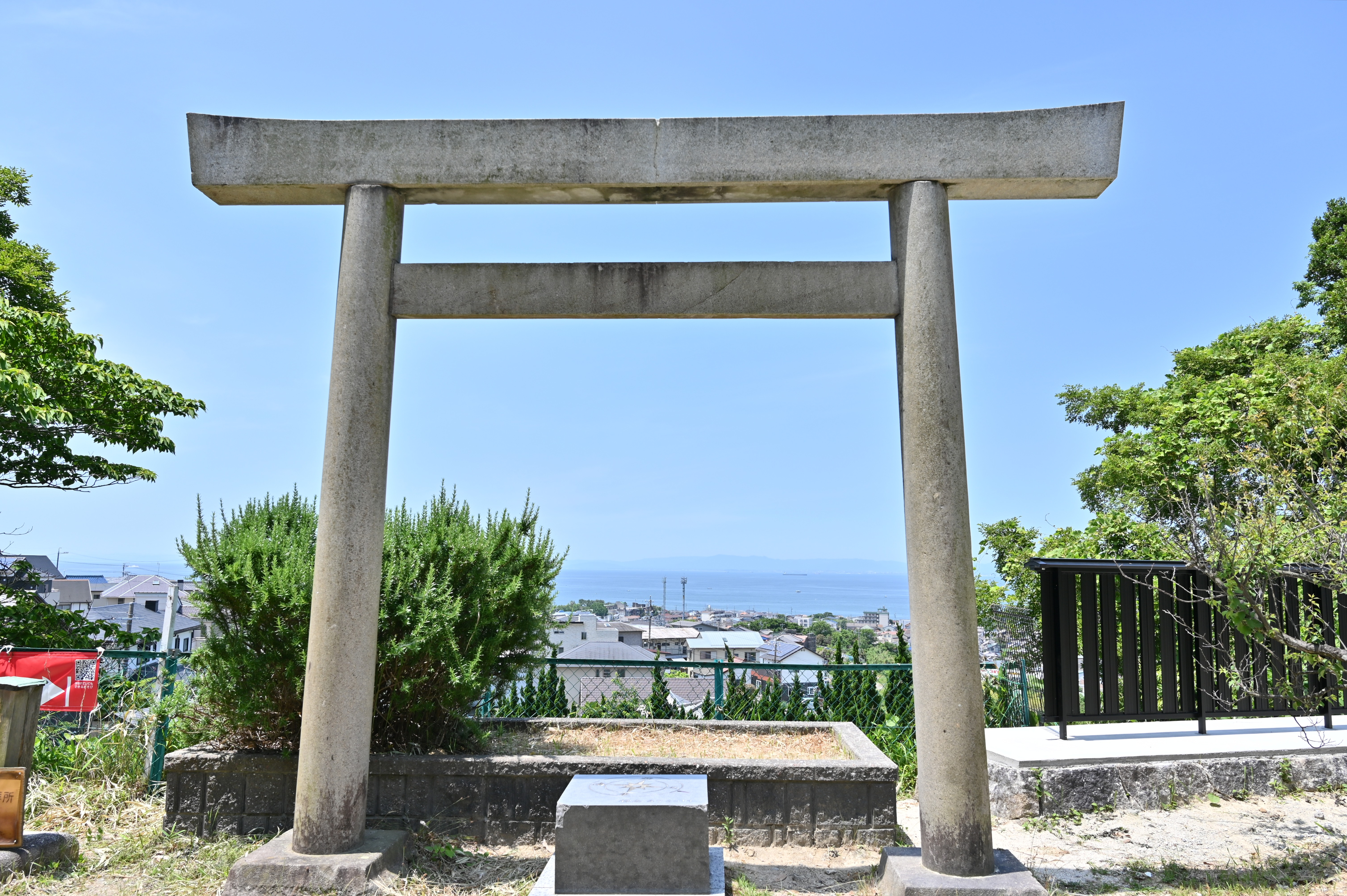 大野城にある桃山御陵遥拝所跡 Nikon Z 6